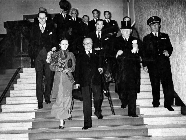 Berlin, Ankunft des chinesischen Botschafters Ankunft des neuen chinesischen Botschafters in Berlin Heute mittag traf auf dem Anhalter Bahnhof der neue chinesische Botschafter Chen-Chih in Berlin ein. U. B. z. Botschafter Chen-Chih verlässt mit seiner Tochter den Anhalter Bahnhof, rechts Konsul Schubert vom Auswärtigen Amt, links Legationsrat v. Strachwitz 21.09.1938 [Herausgabedatum] Abgebildete Personen: Schubert, Conrad von: Gesandtschaftsrat, Legationsrat, Konsul, Bundesrepublik Deutschland Chen Chieh: Botschafter in Deutschland, China